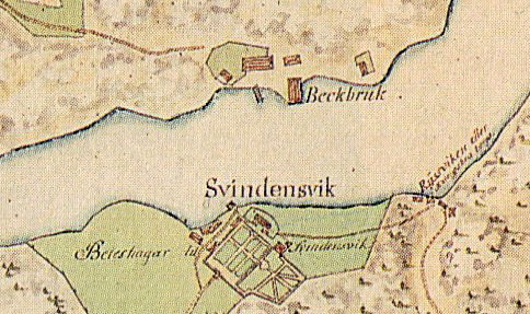 Del av karta över Sicklaön från 1744